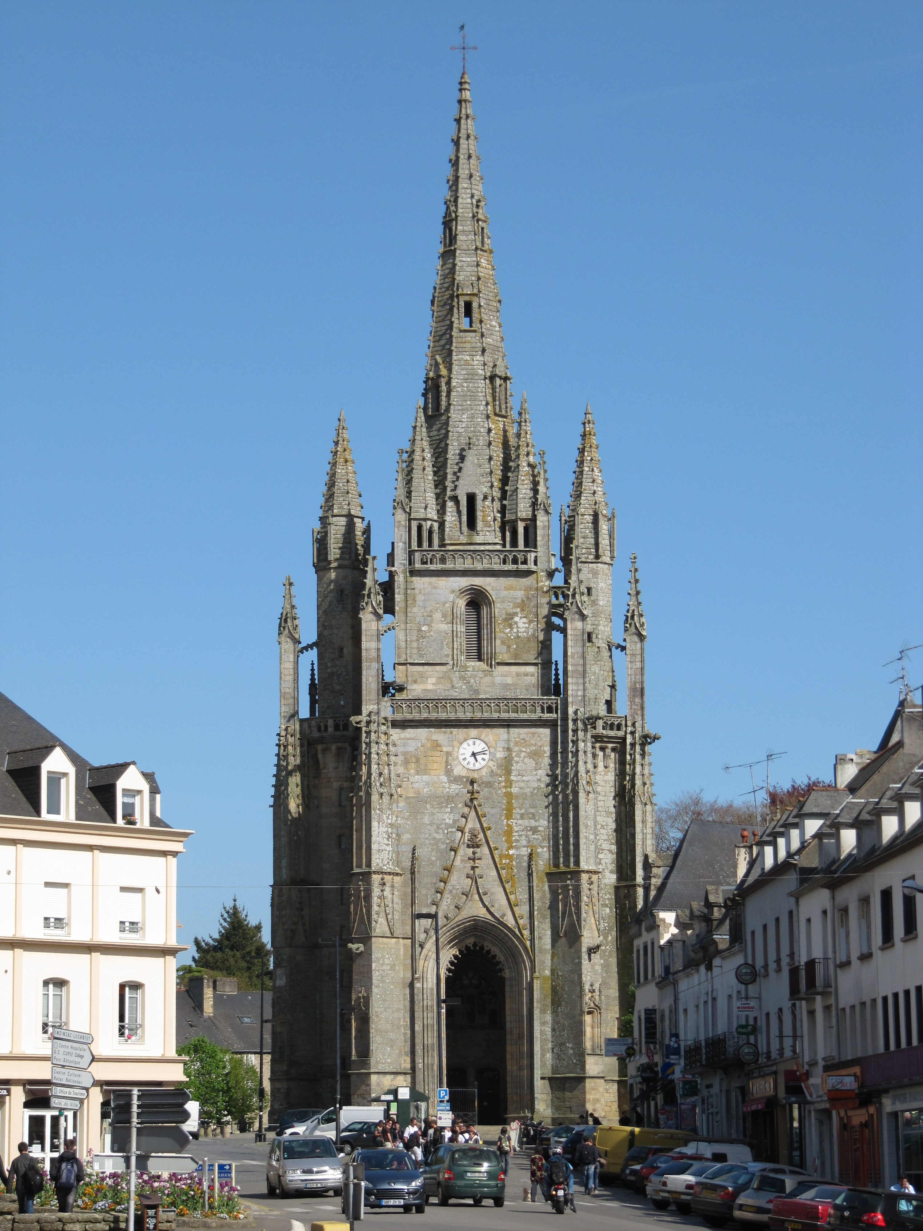 Basilique Notre Dame de Paradis d'Hennebont dans le Morbihan .